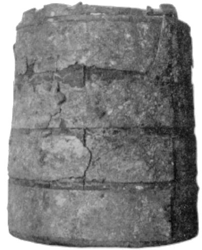 Ottarshögen, kärlet med aska.